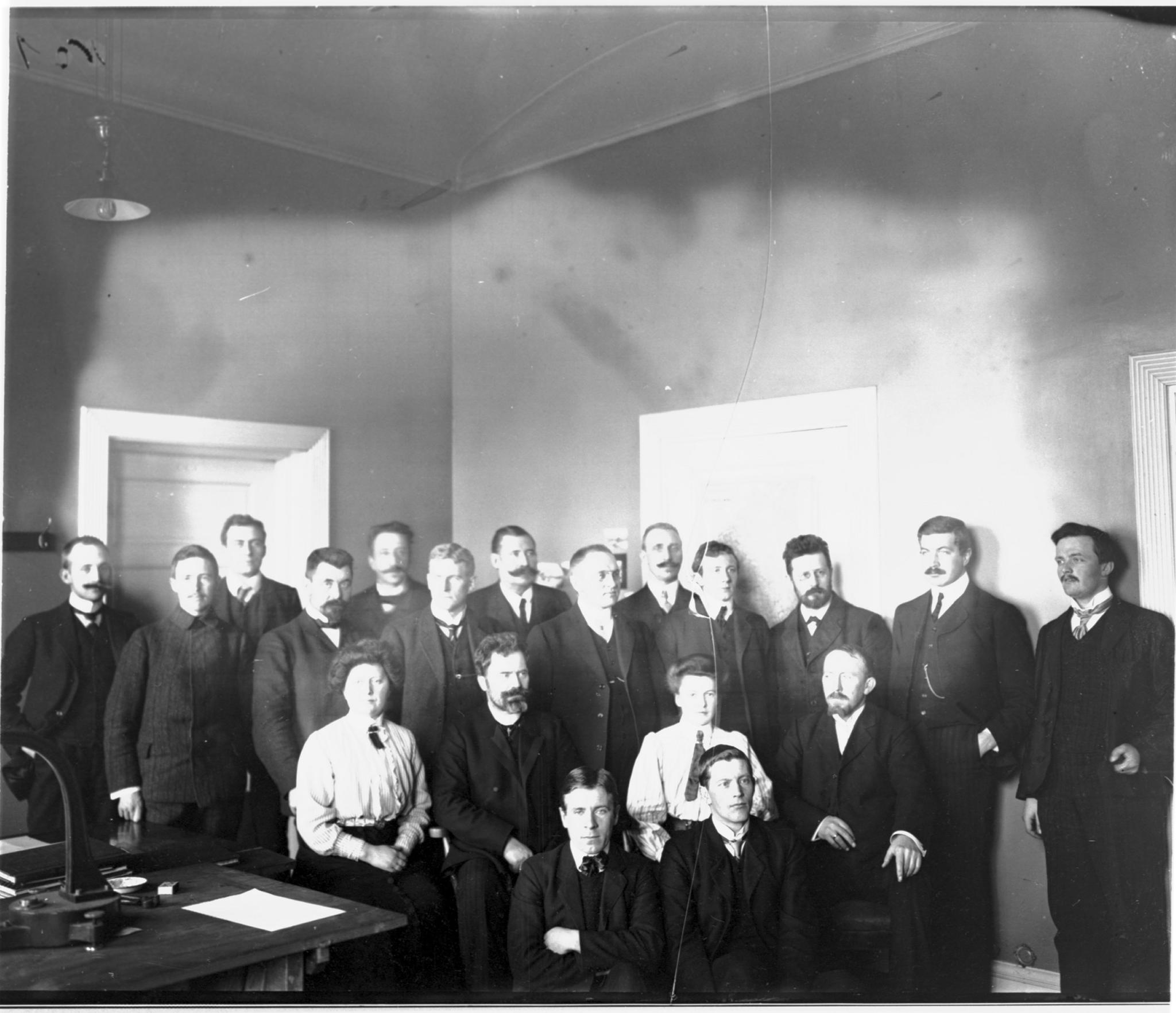 Vassdragsvesenets ansatte våren 1910. Stående fra venstre ing. O. Elverum, ing. O. Vold, ing. V. S. Bull, H. G. Slottum, ing. L. Nilsen, ing. R. F. Ræder, H. Steen, kasserer O. Øen, ing. O. Rogstad, A. Fossum, A. Holmsen, ing. Kr. Enger og ing. N. Anker. Sittende i annen rekke M. Henriksen, vassdragsdirektør Ingvar Kristensen, E. Hugo og ing. A. Hugo-Sørensen. I første rekke fra venstre ing. J. Holm og S. Kvalem. Vassdragsvesenet. Dato: xx.xx.1910